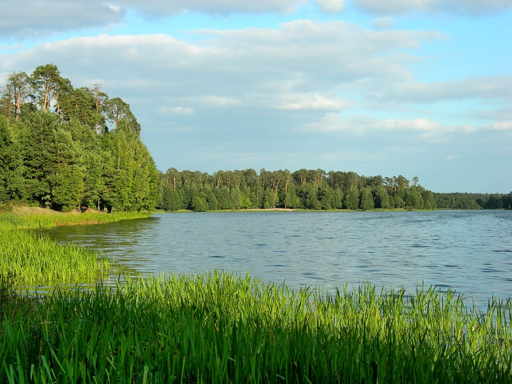 Zalew w Jedlni Letnisko